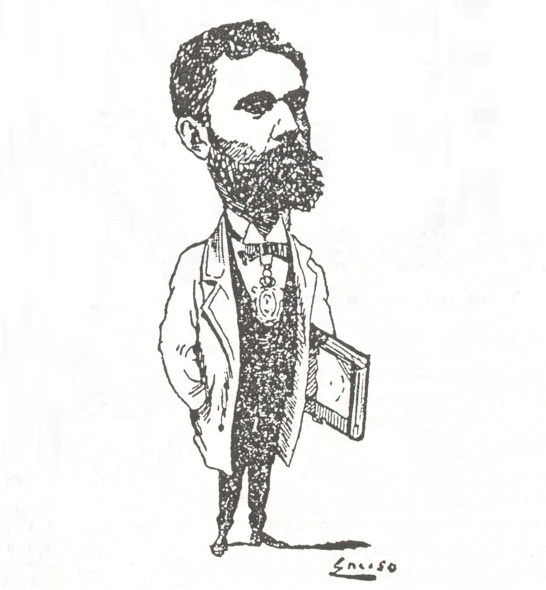 Caricatura de Victoriano Encinas y Reyes por García Enciso